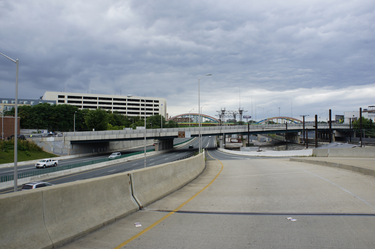 中文（台灣）: 查爾斯街至83號州際公路的匝道